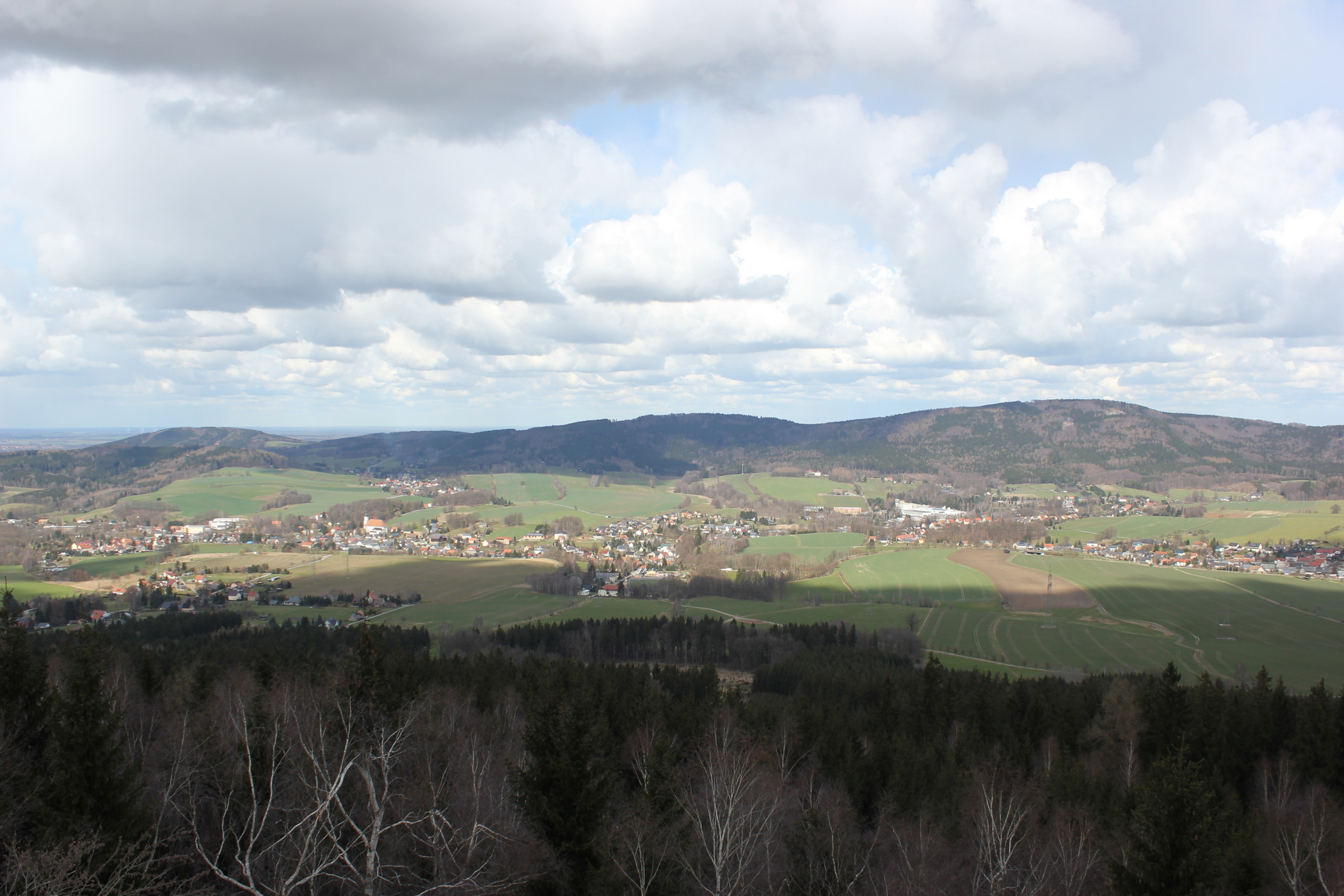 Hornjoserbsce: Wuhlad wot Běłoboha do Kumwałda.